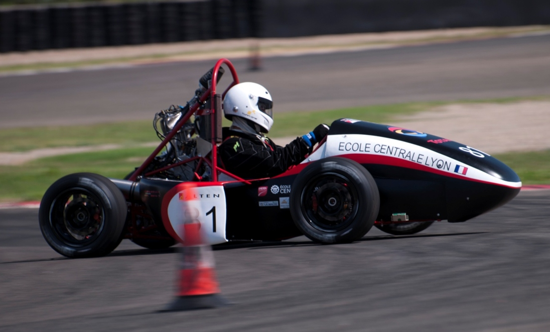 Véhicule Dynamix de l'Ecole Centrale de Lyon